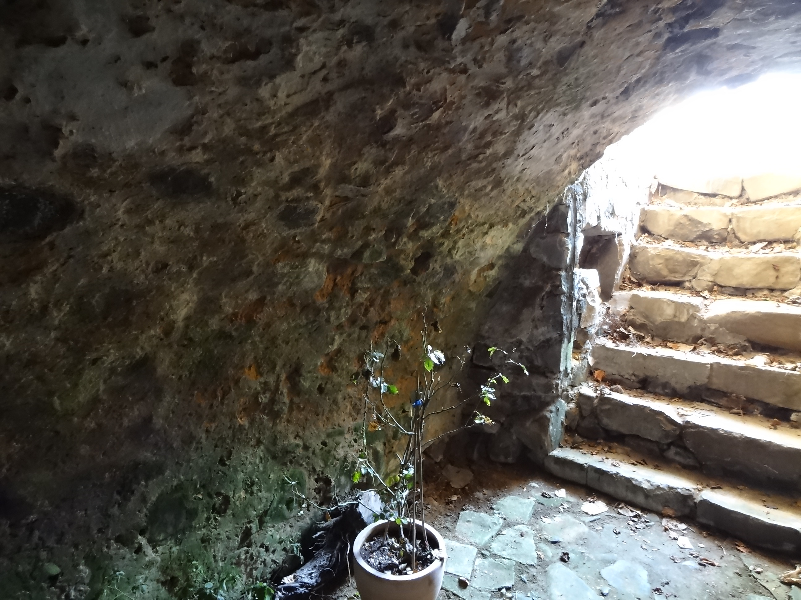 Jüdisches Ritualbad (Griedel)